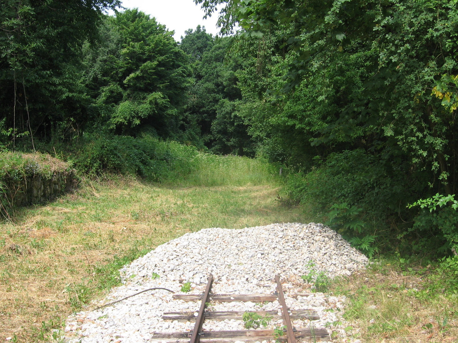 2015. A jelenlegi végpont. Régen még 8 km hosszan mentek tovább innen a sínek